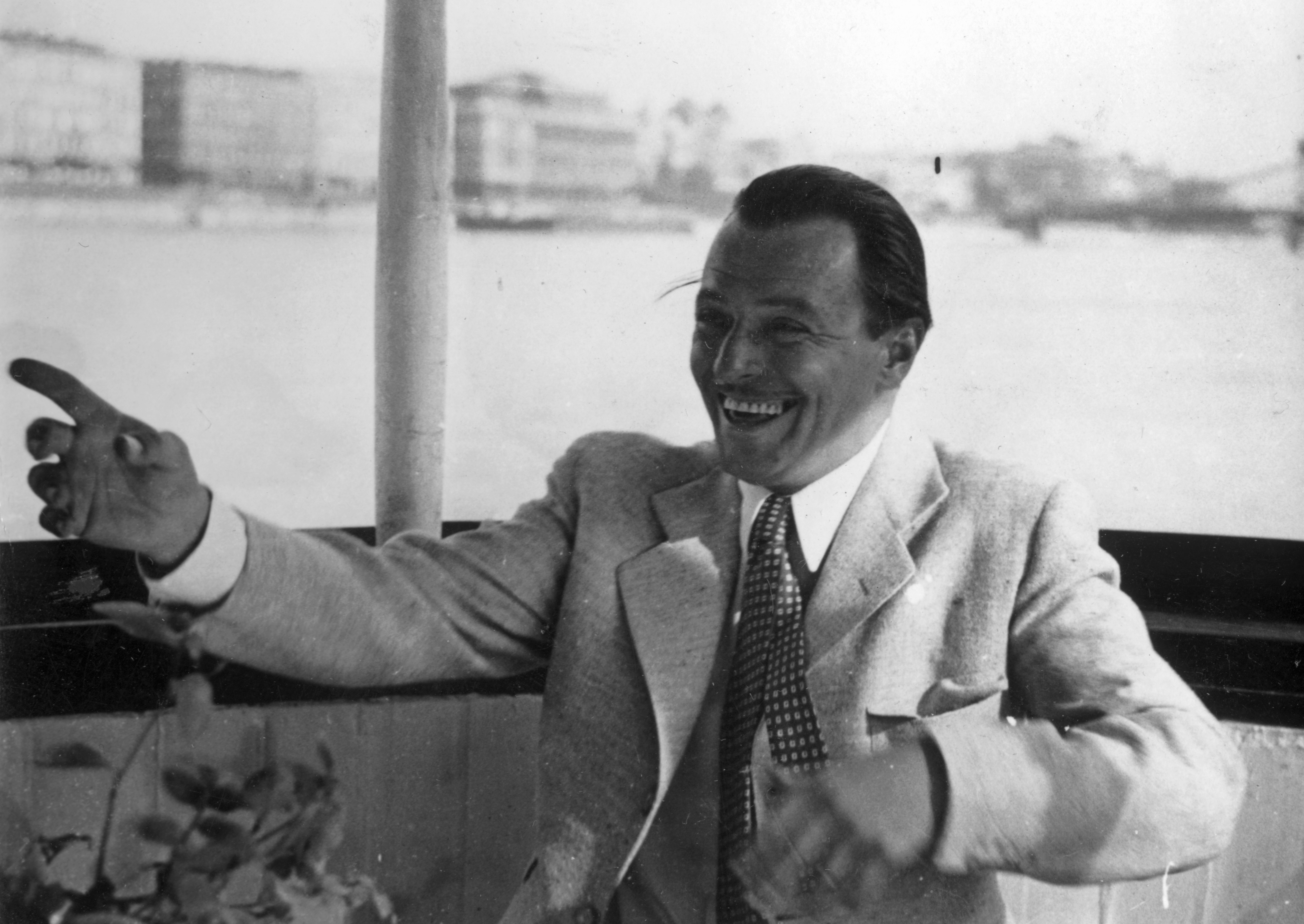 Jávor Pál színművész egy dunai hajón, háttérben a Lánchíd. Location: Hungary, Budapest Tags: ship, actor Title: Jávor Pál színművész egy dunai hajón, háttérben a Lánchíd.